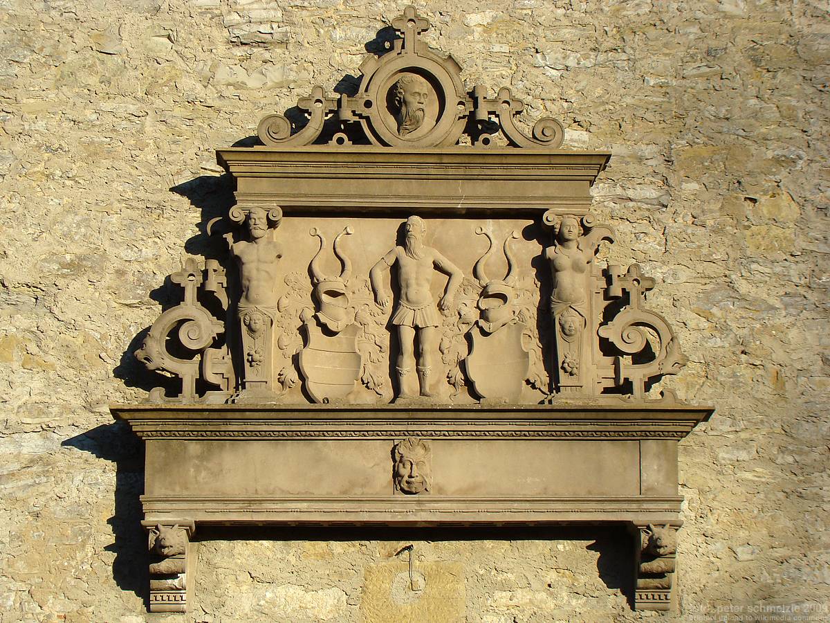 Wappen über dem Portal von Schloss Presteneck in Stein am Kocher (Neuenstadt am Kocher)